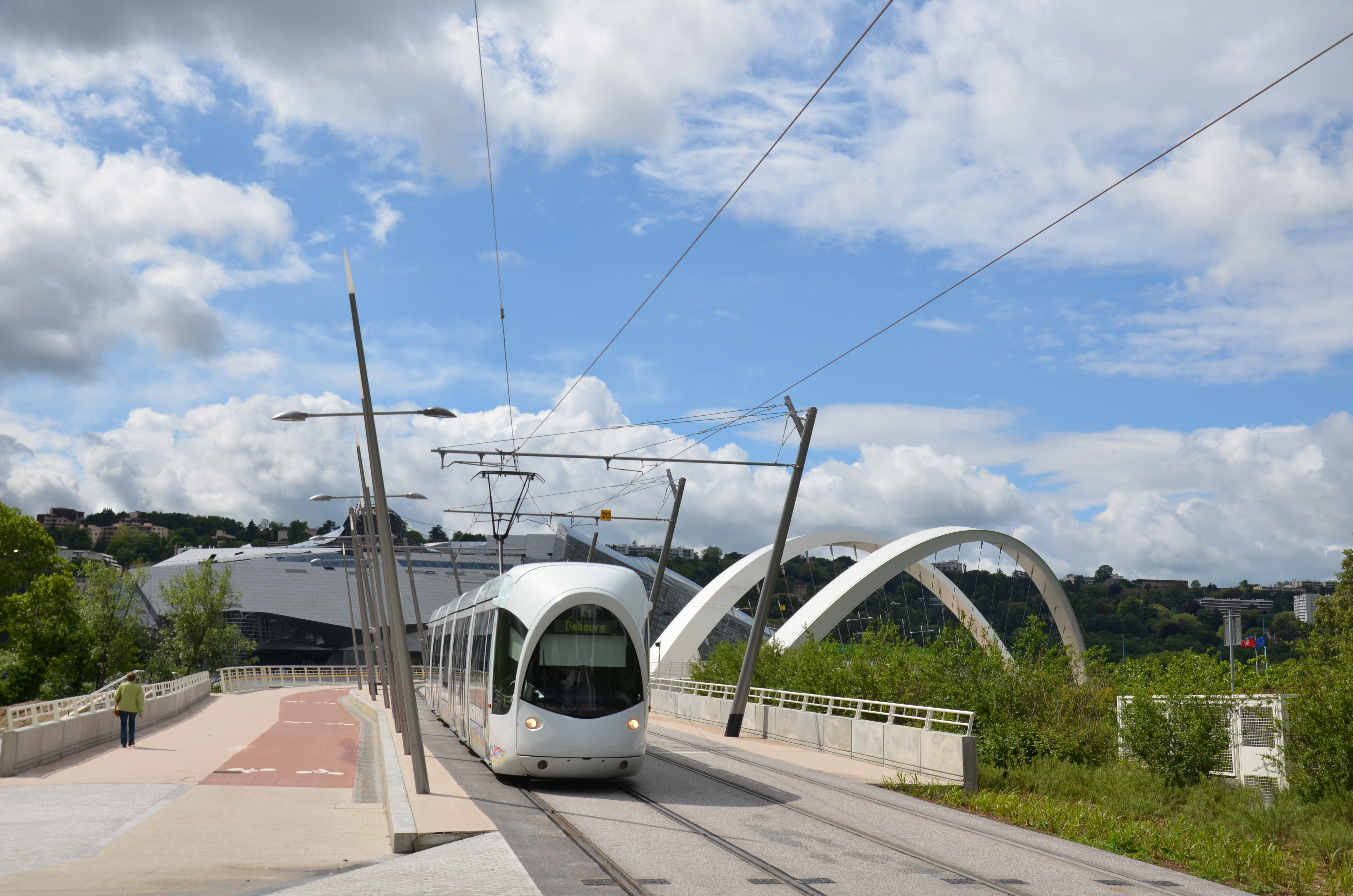 La rame n°807 du tramway T1 du réseau TCL de Lyon arrive à la station « Halle Tony Garnier », après avoir franchi le Rhône grâce au Pont Raymond Barre. Vous pouvez apercevoir en arrière-plan le Musée des Confluences en travaux.